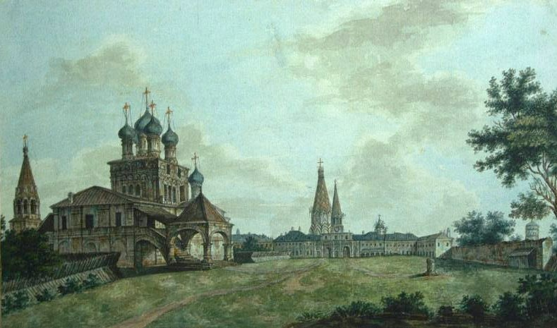 Вид села Коломенское около 1800 г. Wiev of Kolomenskoe. c. 1800